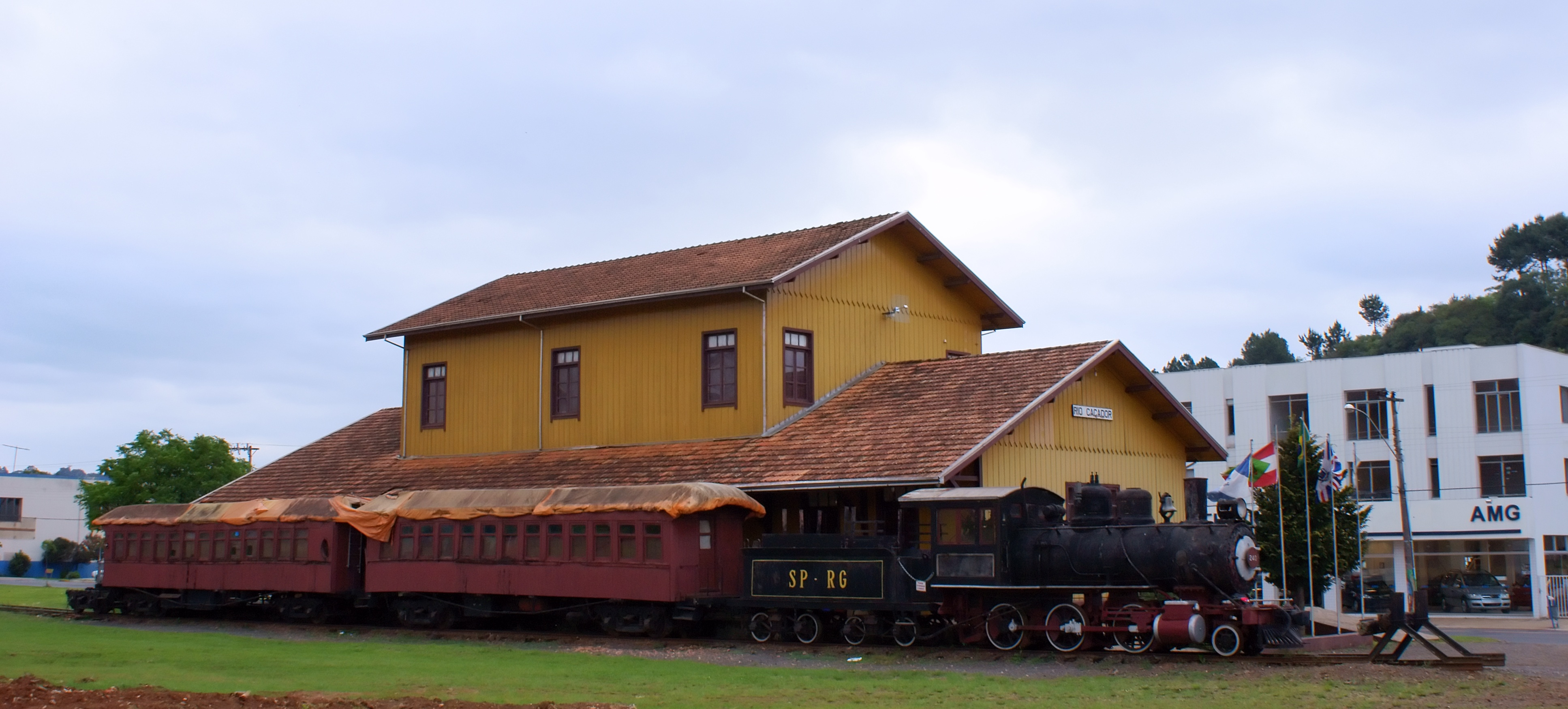 Contestado Museum with Locomotive and passenger wagons, Caçador, Santa Catarina, Brazil